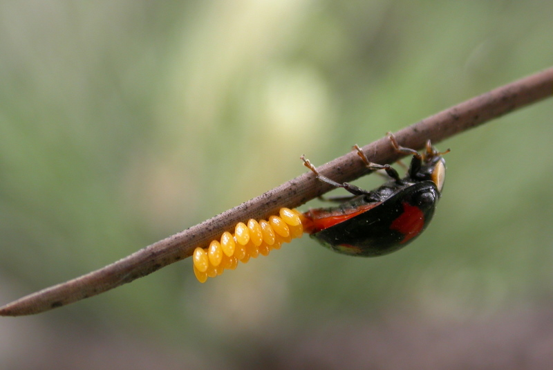 egg laying - Harmonia axyridis